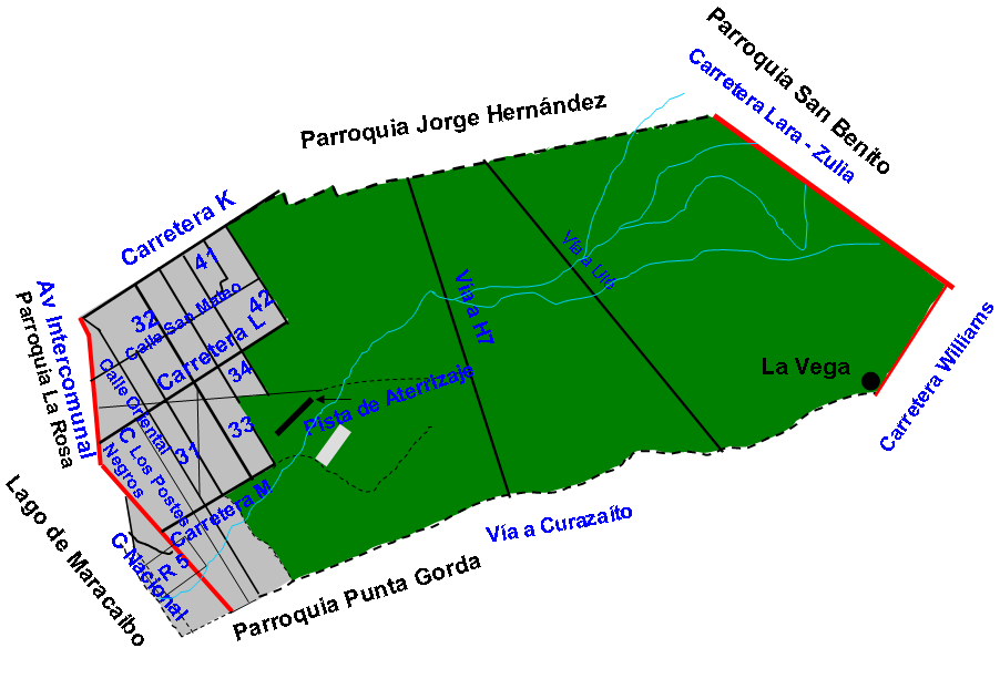 Mapa de la Parroquia Jorge Hernández, Municipio Cabimas, Zulia, Venezuela